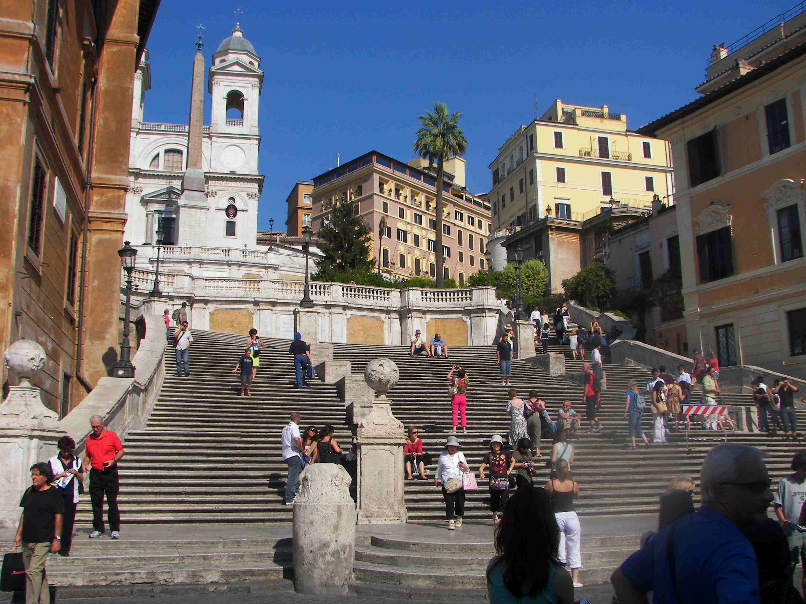 Die Spanische Treppe, italienisch Scalinata di Trinità dei Monti (der deutsche Name stammt von der unterhalb gelegenen Piazza di Spagna), wurde in den Jahren 1723 - 1726 errichtet